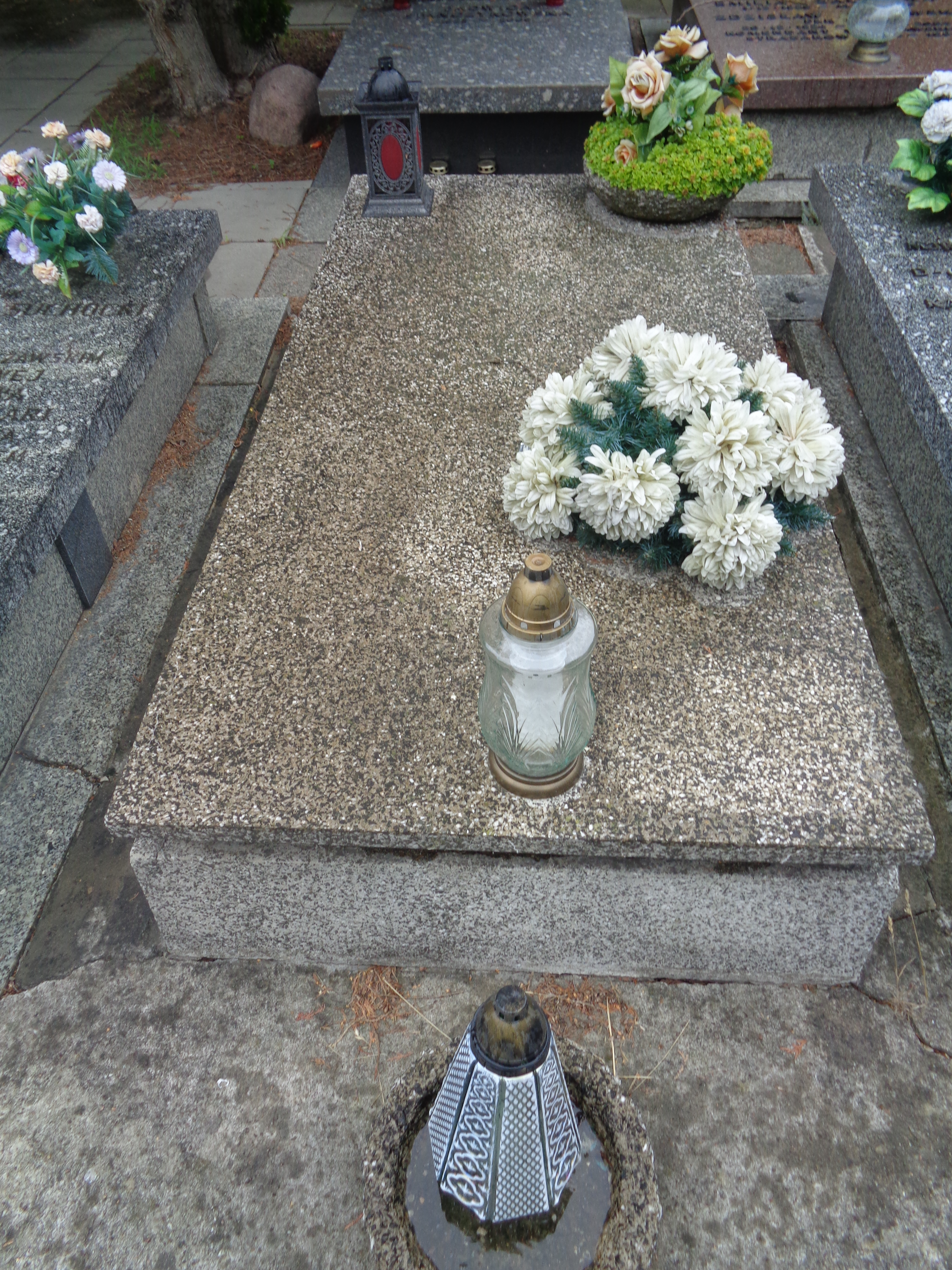 Grób Leona Korzewnikjanca na Cmentarzu Wojskowym na Powązkach